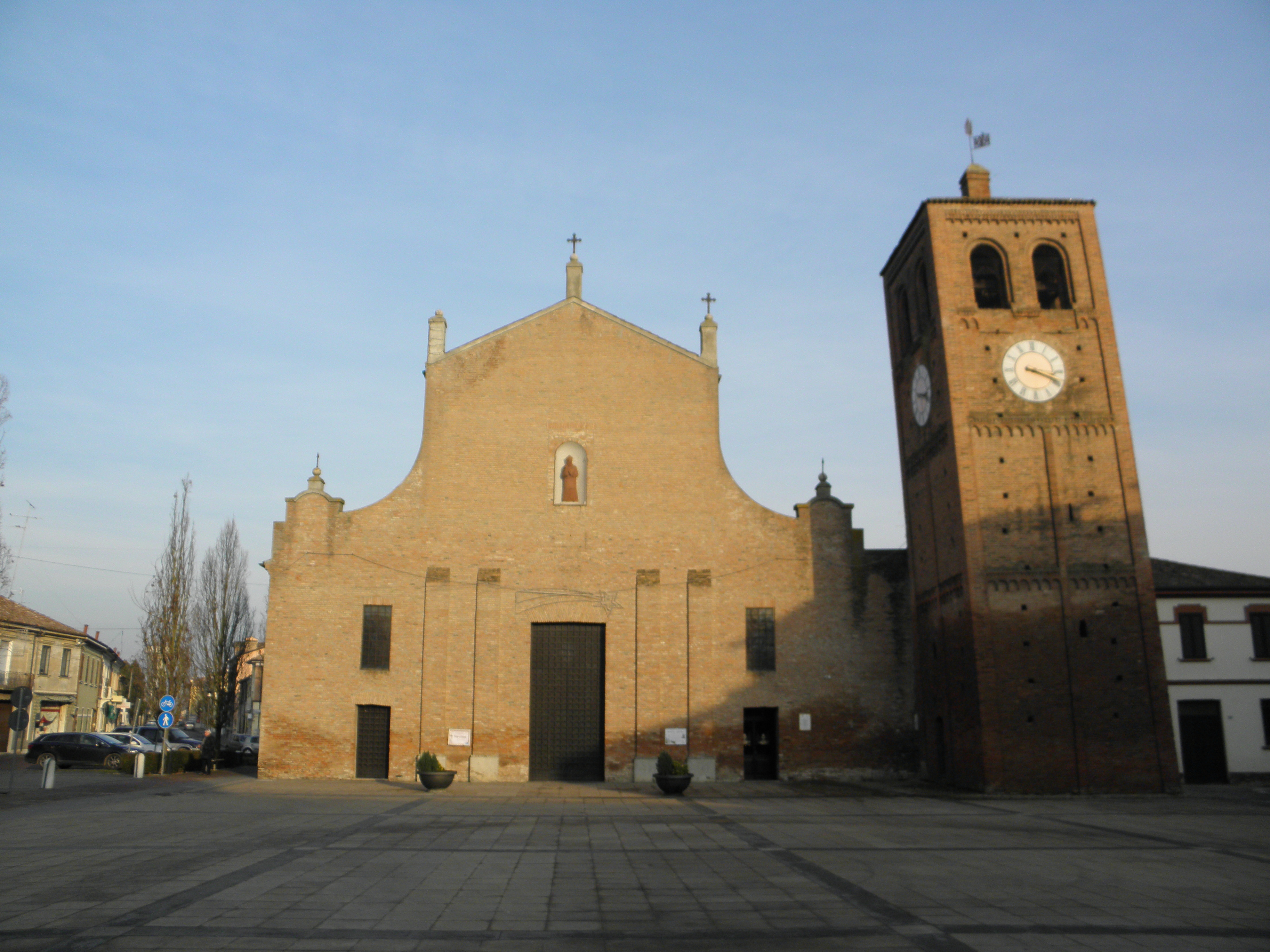 Massa Fiscaglia, già comune autonomo e ora frazione del comune di Fiscaglia: la settecentesca chiesa dei Santi Pietro e Giacomo con a fianco il più antico campanile in stile romanico-lombardo.